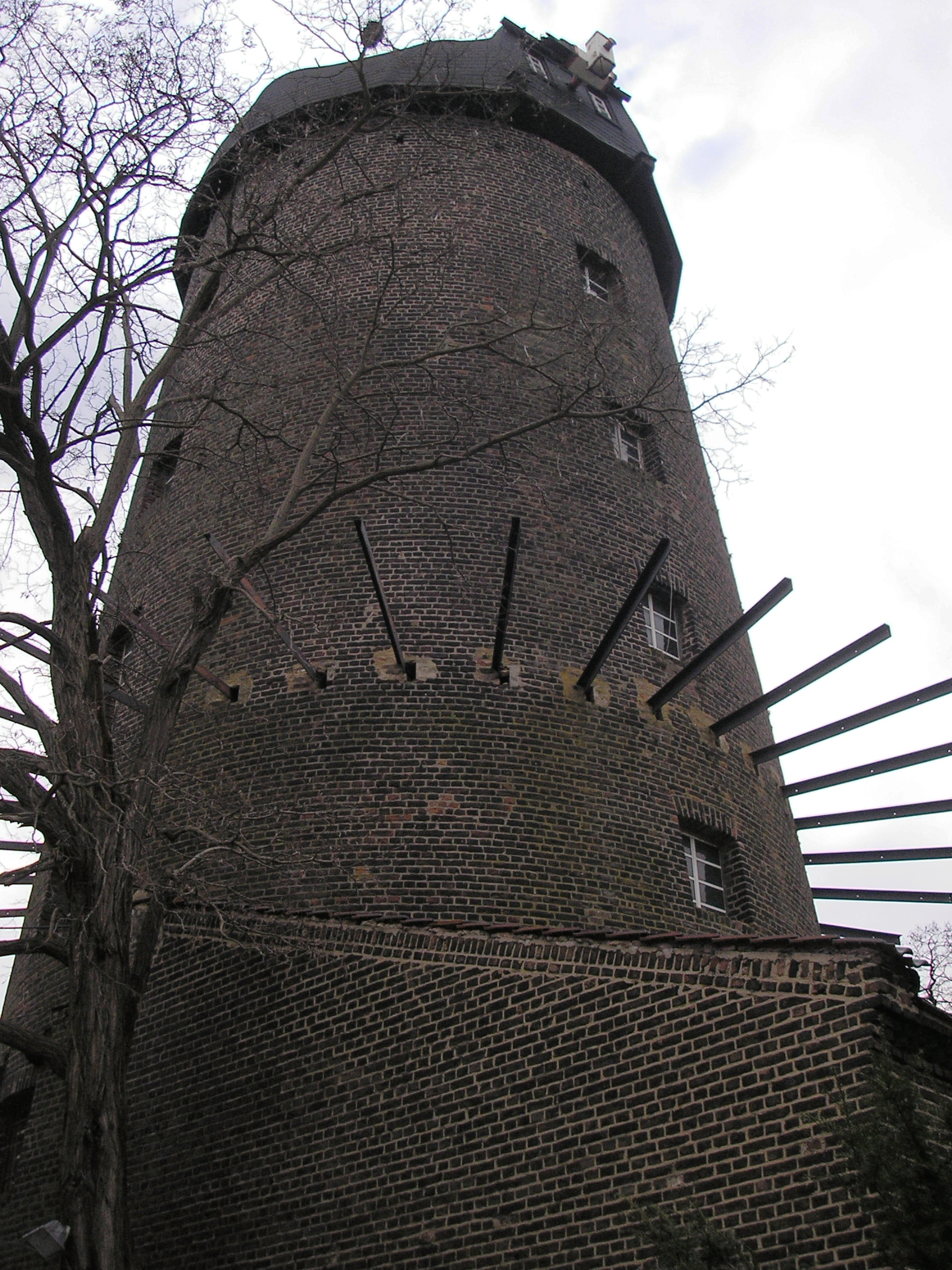 Mühle Köln-Godorf am Godorfer Hafen This is a photograph of an architectural monument.